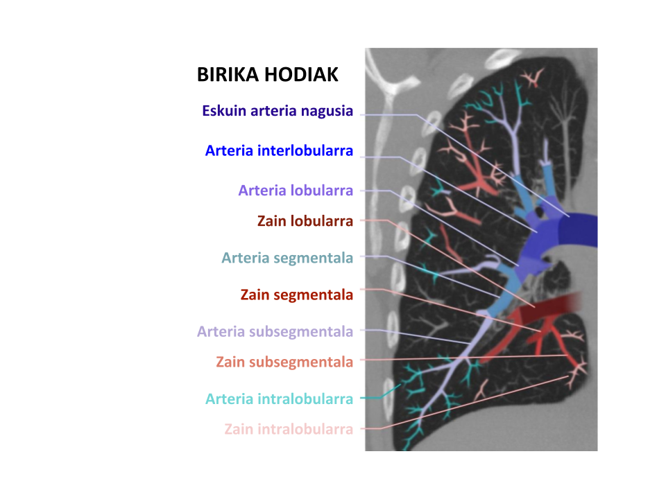 birika